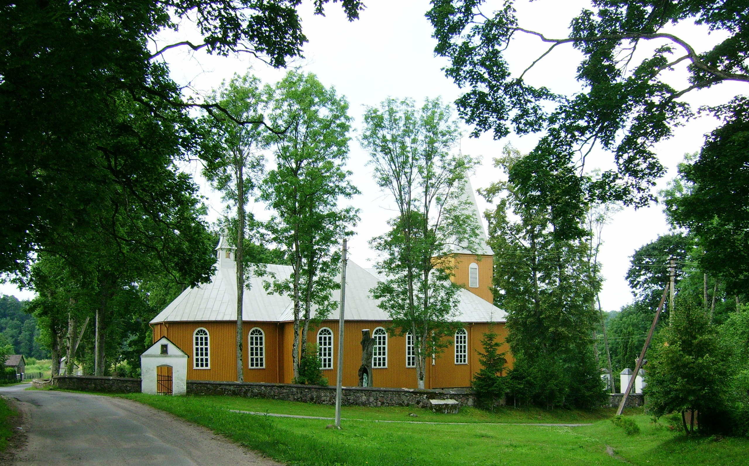 Žvingių Bažnyčia